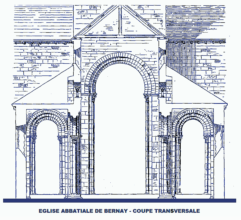 Abbaye de Bernay, Coupe transversale (image du domaine public modifiée, Congrès archéologique, Caen, 1909)